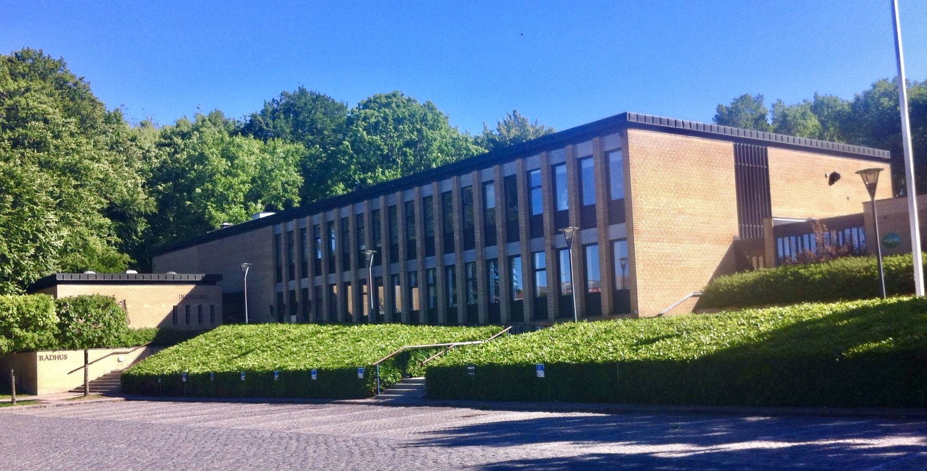 Hadsund Kommunes rådhus på Himmerlandsgade 9, set fra nordøst - nu et administrationscenter i Mariagerfjord Kommune